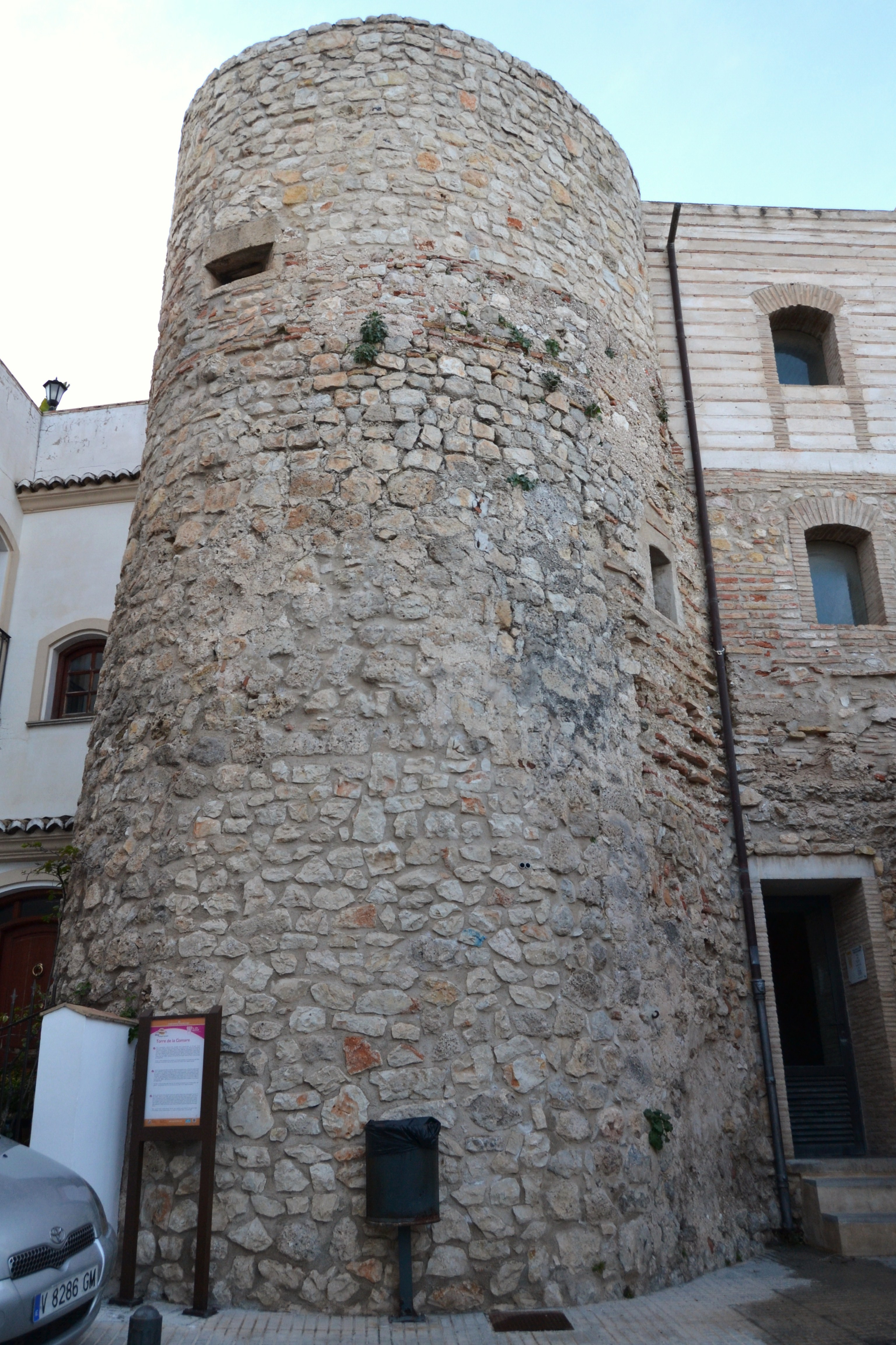 Torre de la Comare, palau dels Centelles, Oliva.